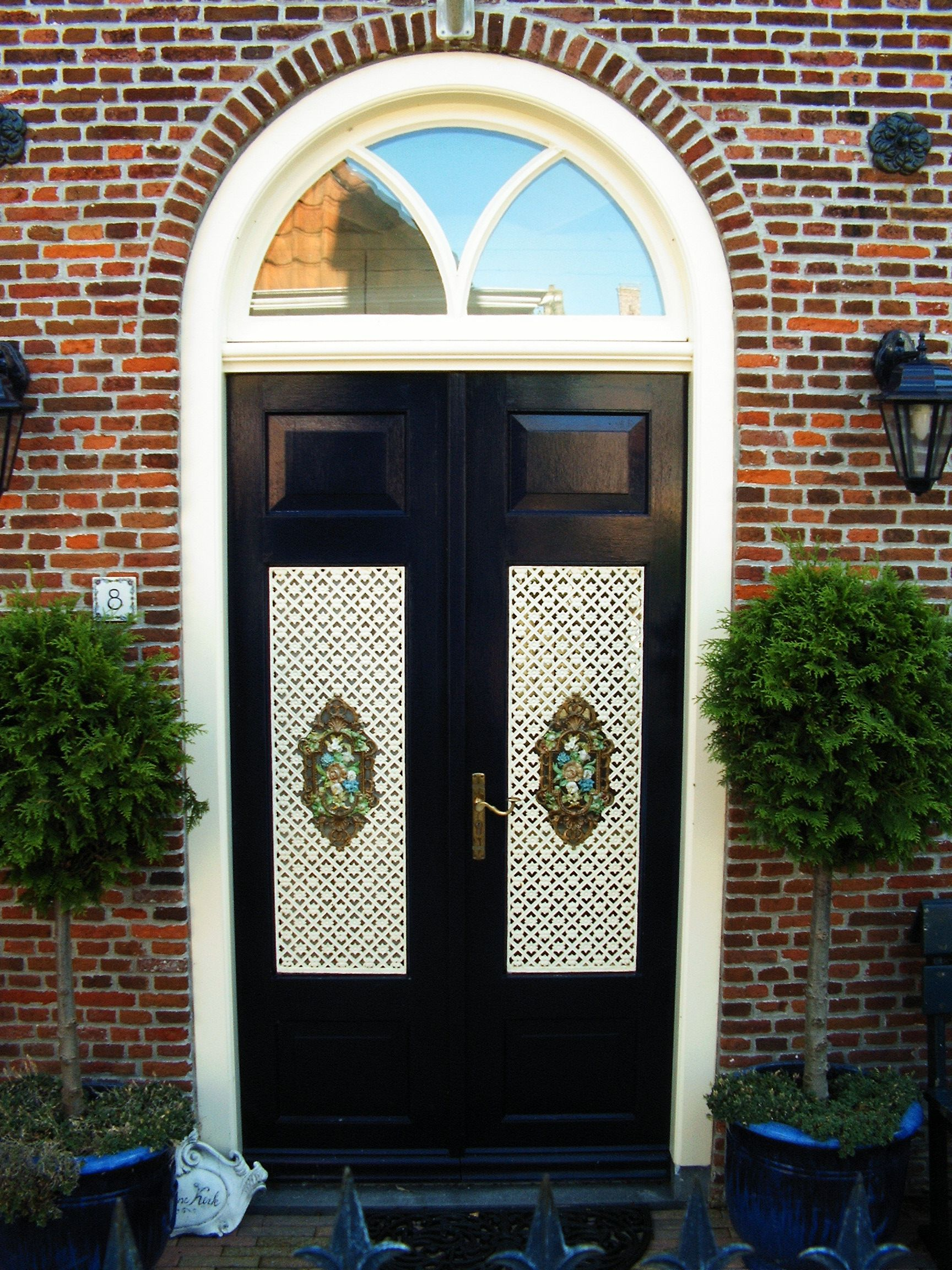 Hindeloopen - Tür in der Nähe der Kirche